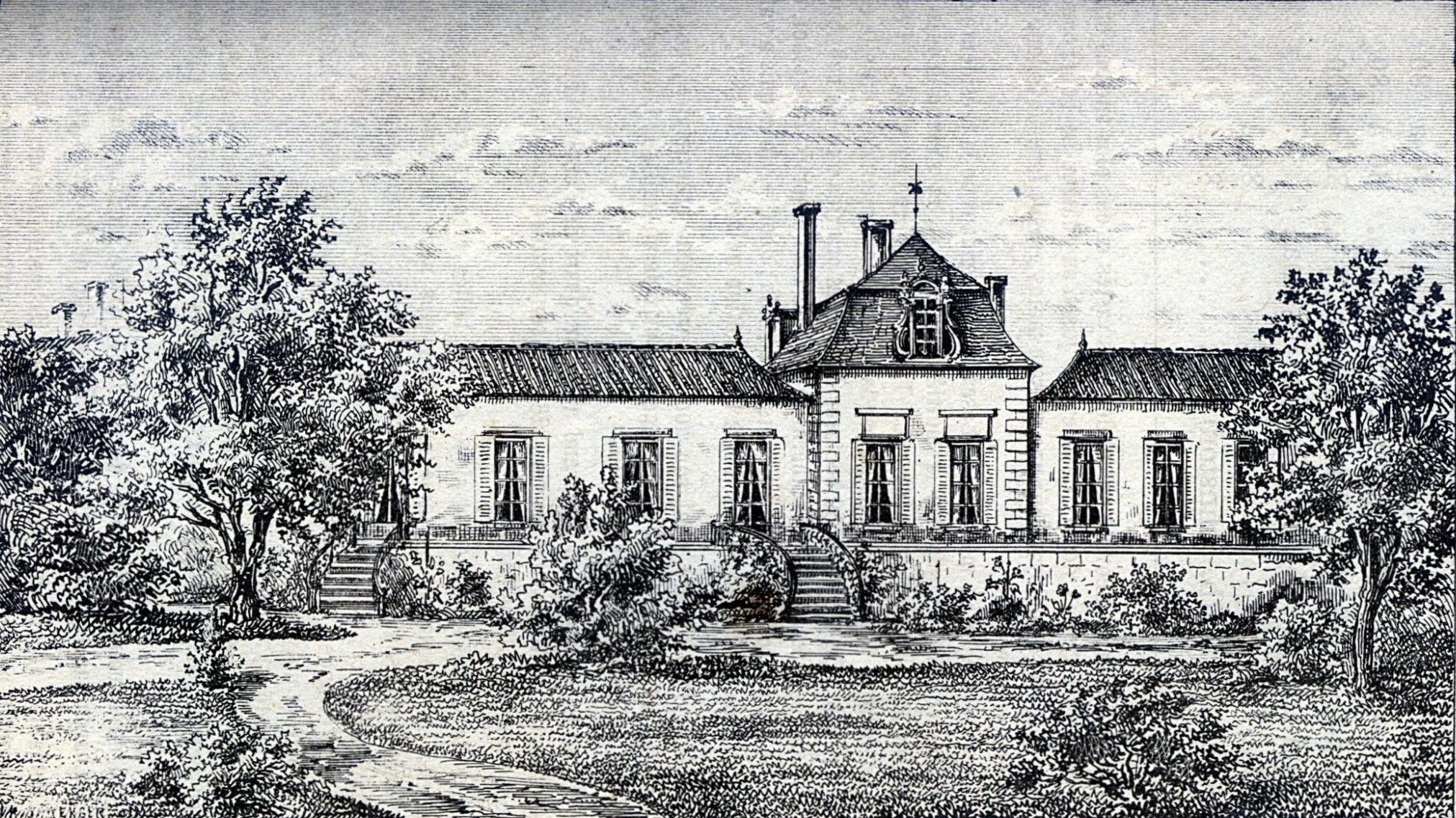 Illustration du Château Léoville Lascases dans l'ouvrage Bordeaux et ses vins classés par ordre de mérite (2ème édition) de Charles Cocks et Edouard Féret publié en 1868